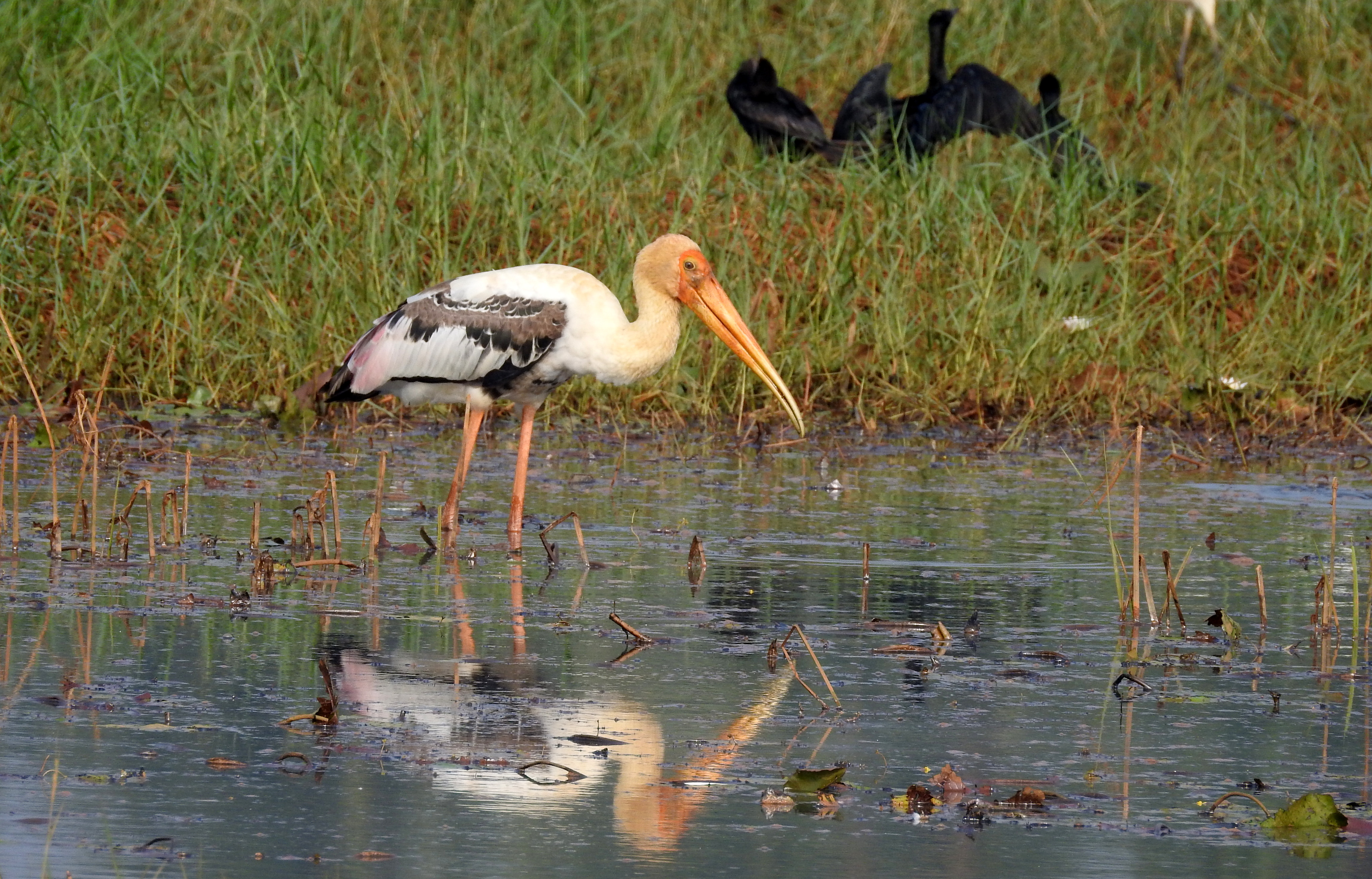 വർണ്ണക്കൊക്ക്, Kole Wetlands Thrissur